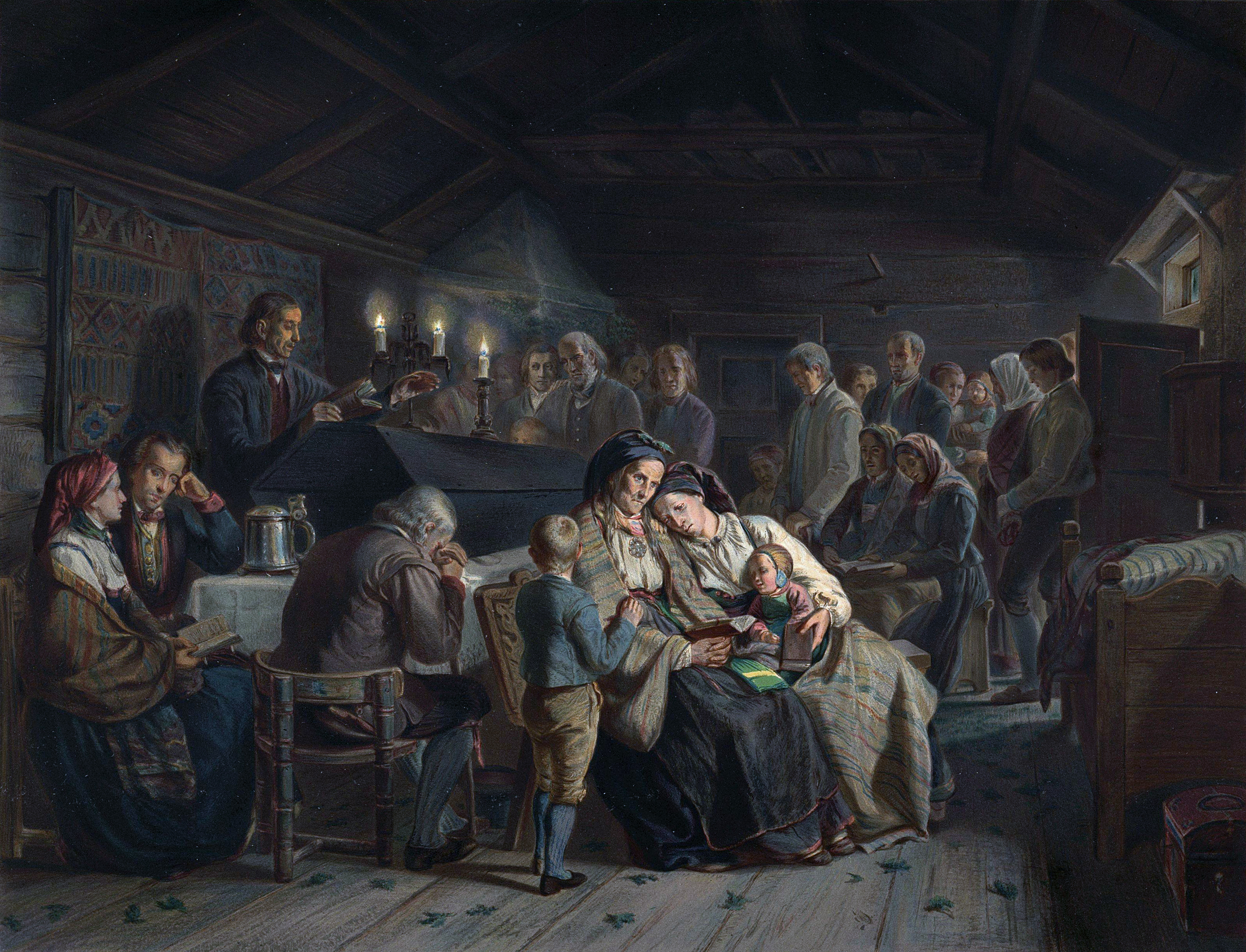 Litografi af Winckelmann & Sönner i Berlin